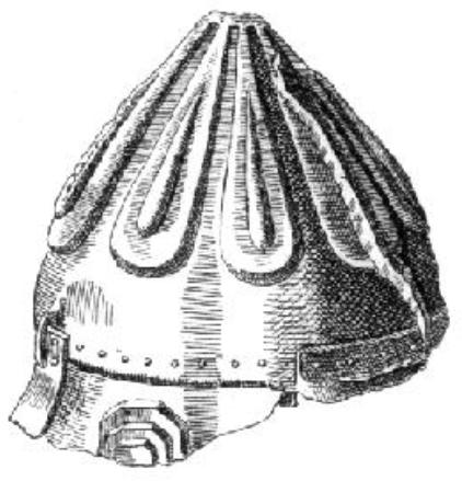 Dobó István sisakja egri síremlékén. illusztráció a A Pallas nagy lexikonában